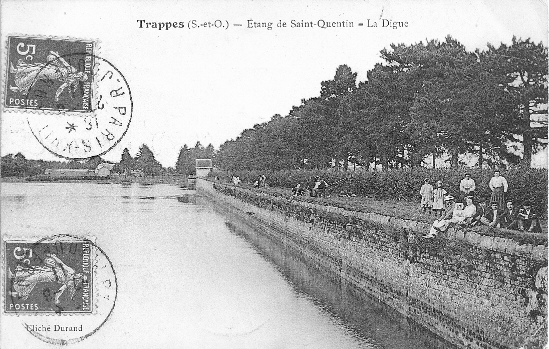 Carte Postale du début du XX siécle